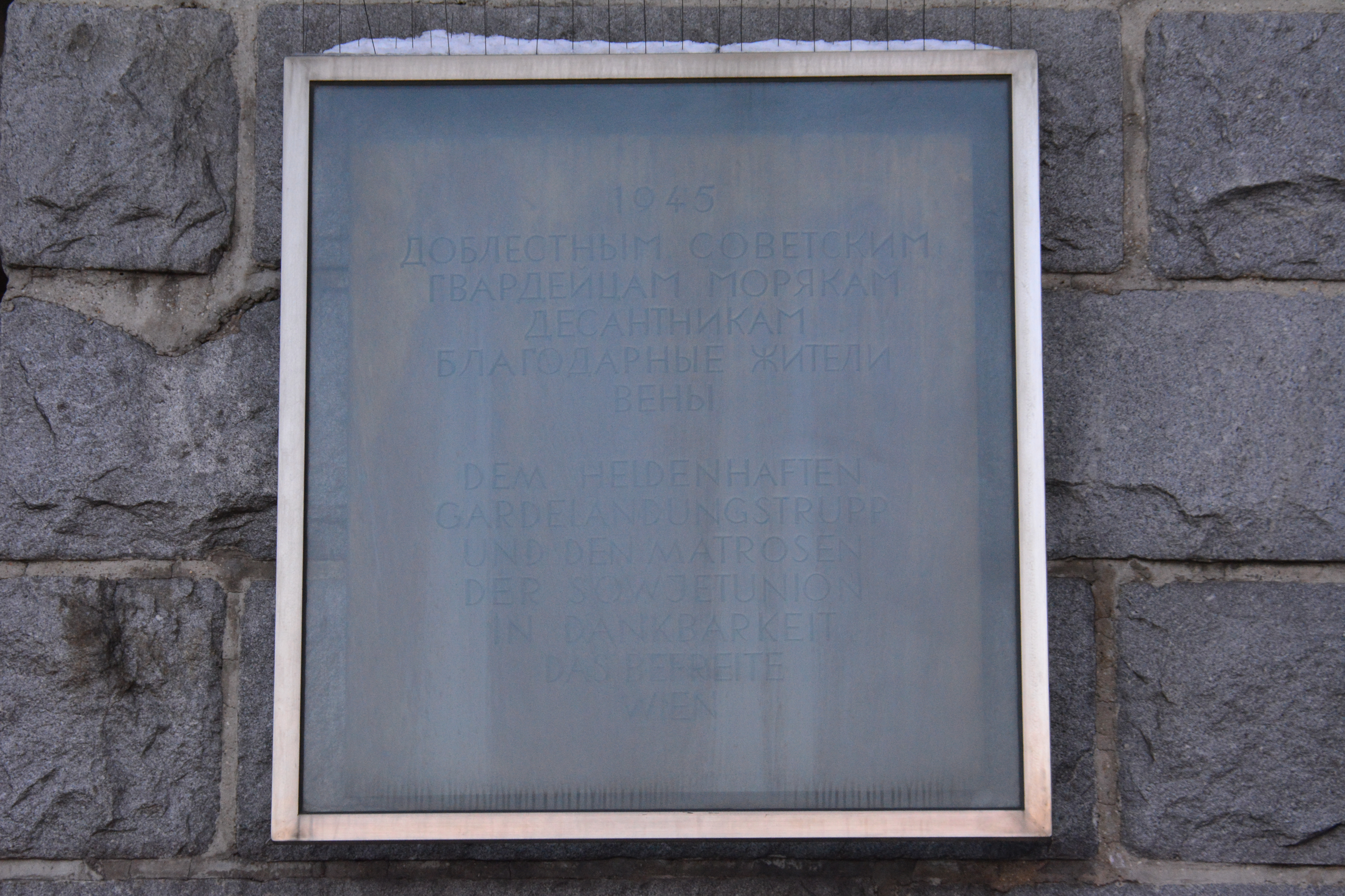 Gedenktafel für den Gardelandungstrupp und die Matrosen (Wien, Mexikoplatz, Reichsbrücke)